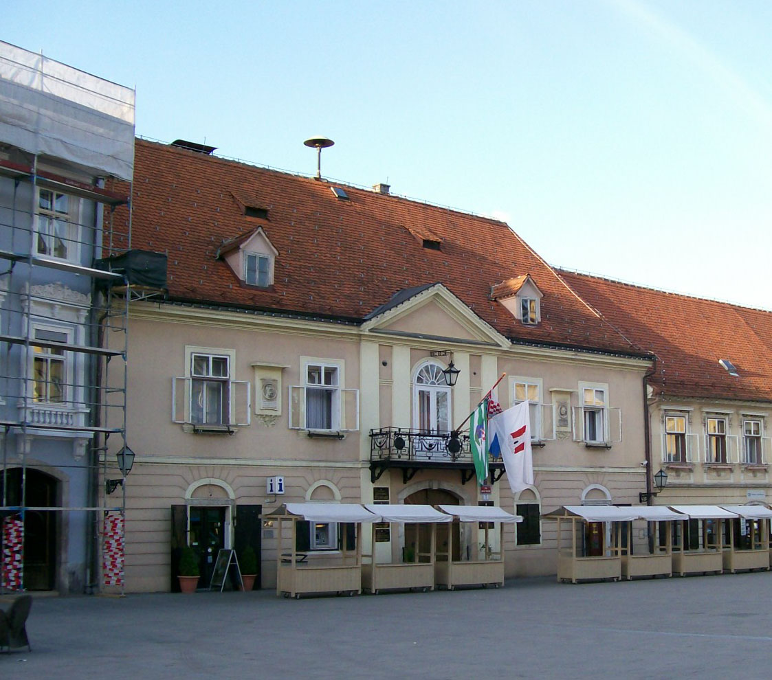 Zgrada Gradskog poglavarstva Samobora